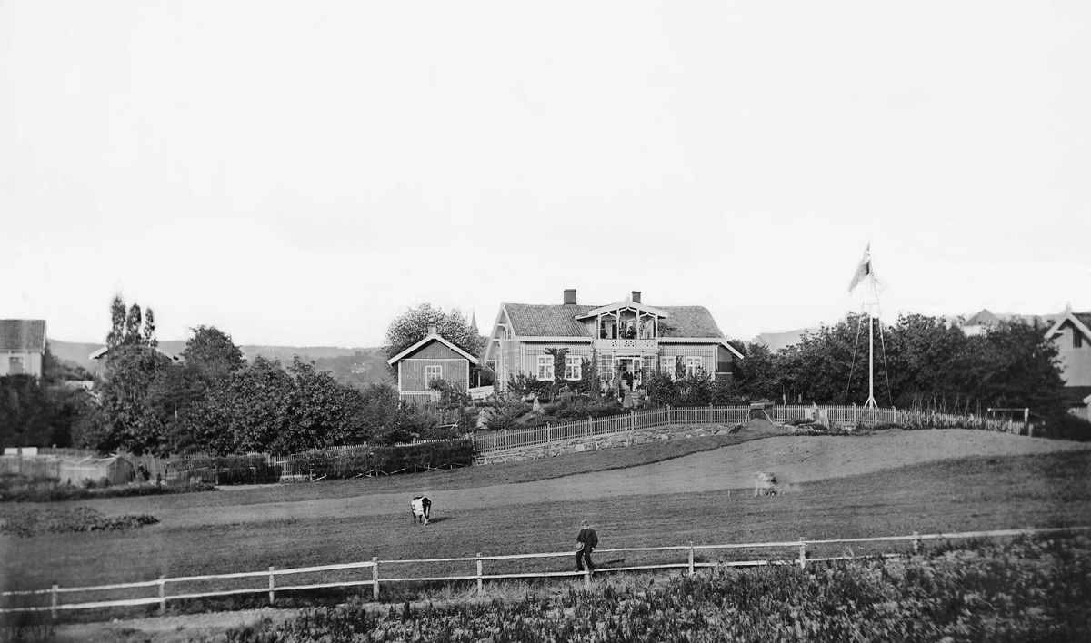 Frøken Muus' hus i nr. 44 (Sognhøi eller Sognhaug løkke), fotografert i 1860-årene av Ole Tobias Olsen. Fra Byhistorisk samling hos Oslo Museum.